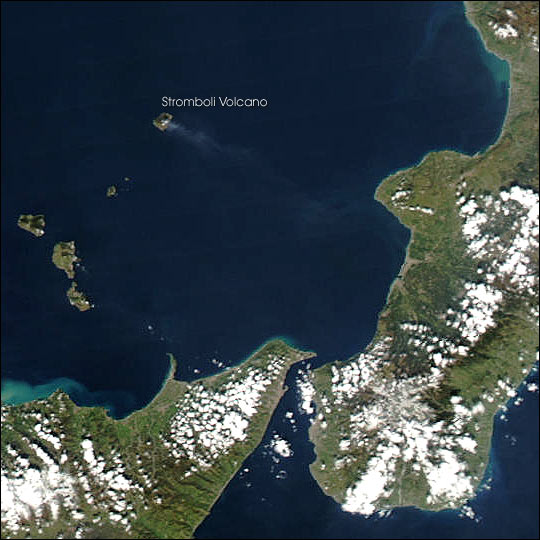 stomboli vulkaan op 5-03 -2003 van